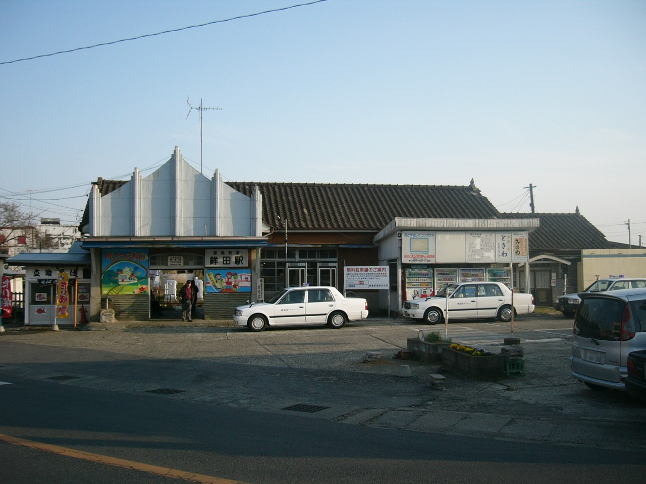 Hokota Station